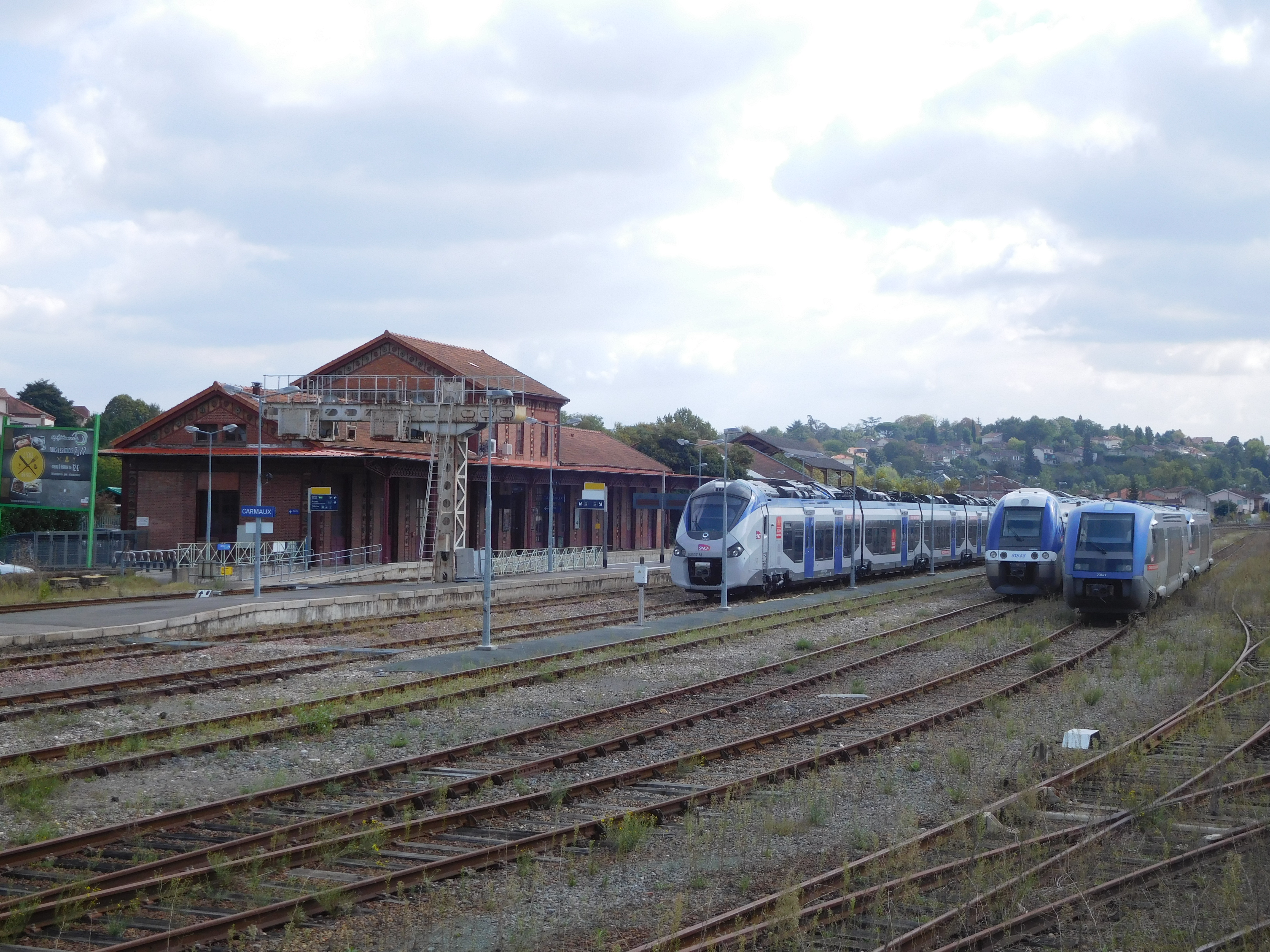 Vue générale de la gare de Carmaux avec Régiolis, AGC et X73500 stationnées.